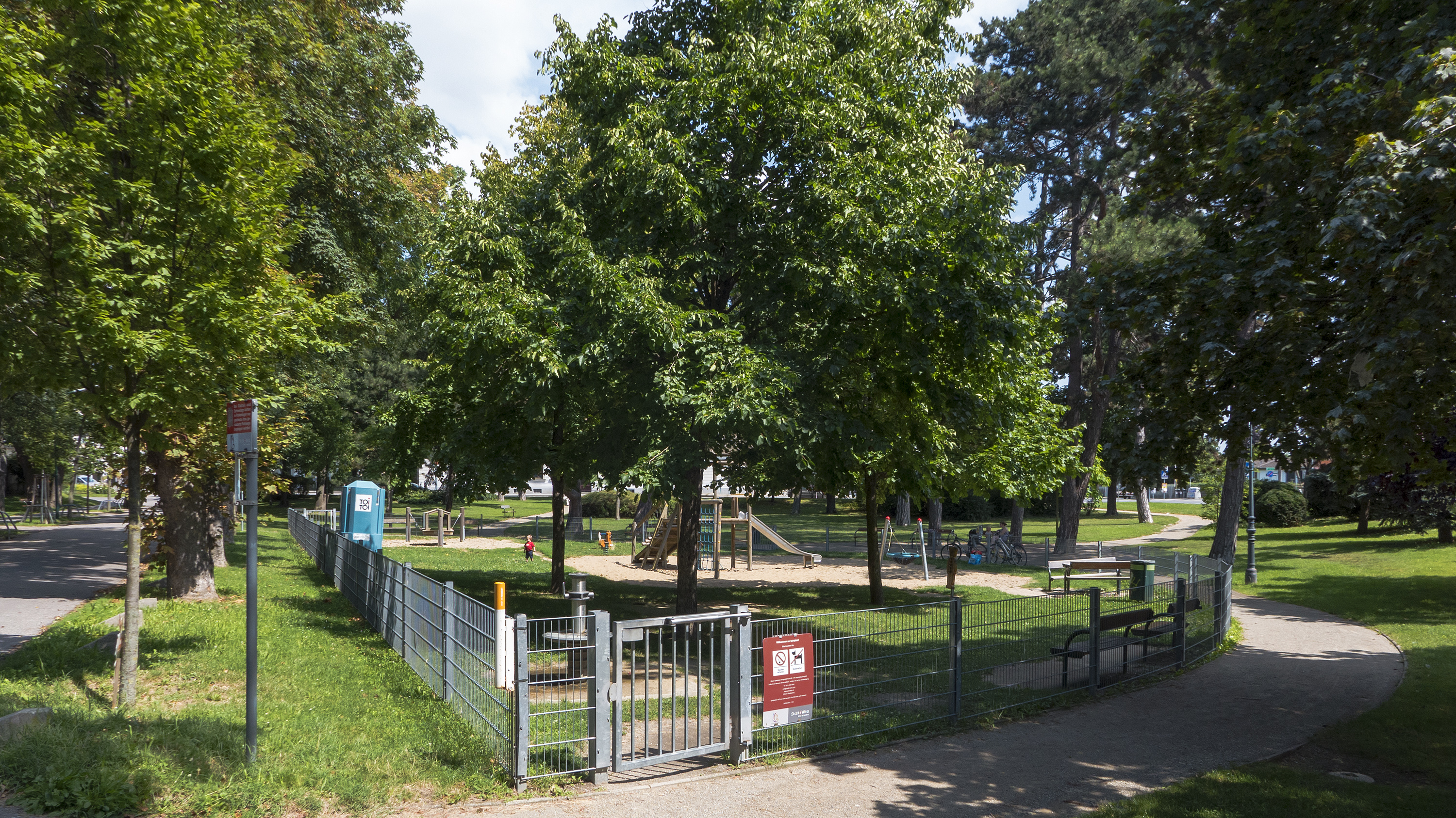 Astrid-Lindgren-Park in Wien 22